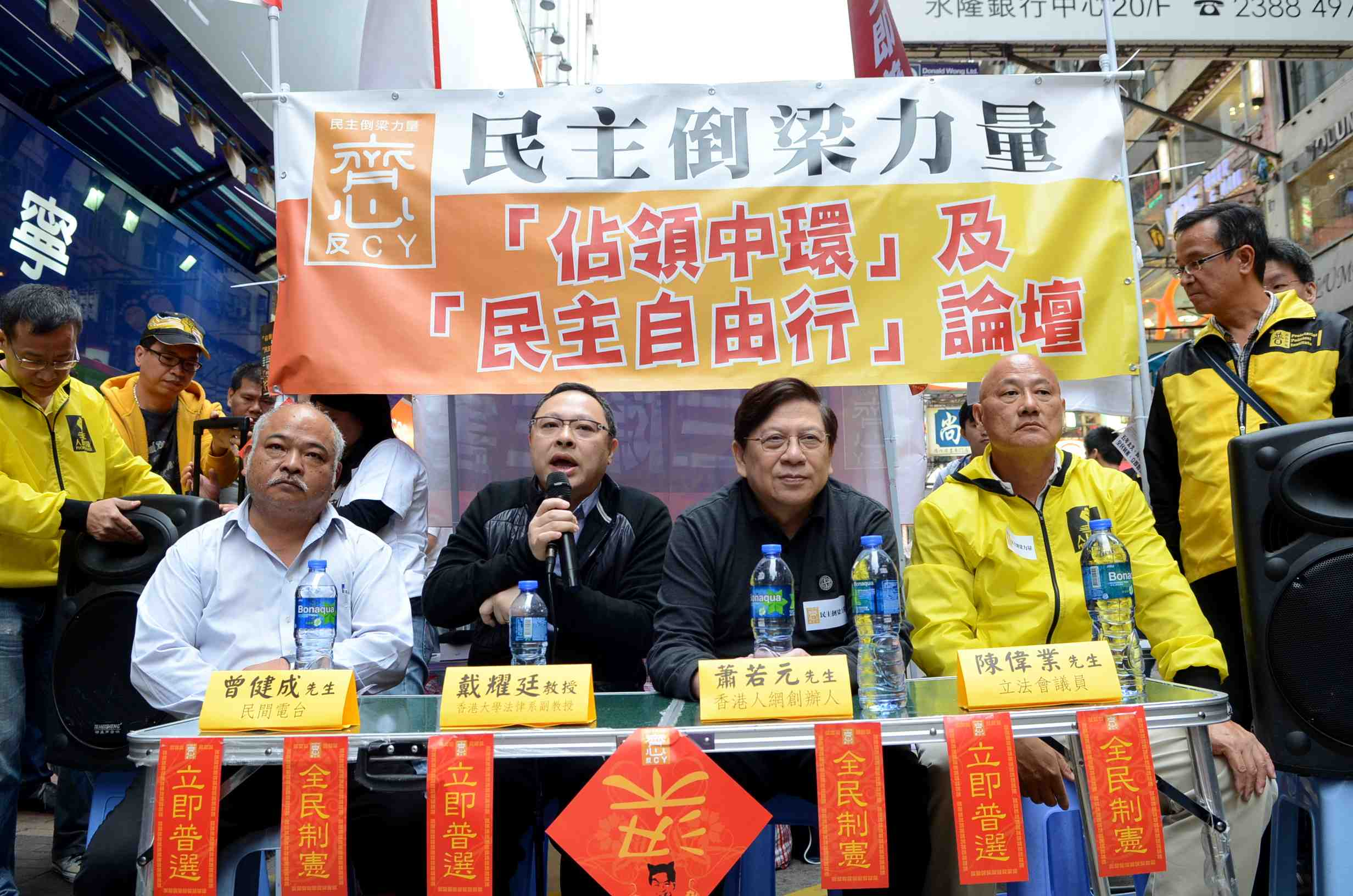 2013年2月24日，旺角西洋菜街，民主倒梁力量街頭論壇，討論佔領中環。嘉賓：「和平佔中」戴耀廷教授、民主倒梁力量召集人陳偉業、香港人網創辦人蕭若元。來源：希望之聲國際廣播電台